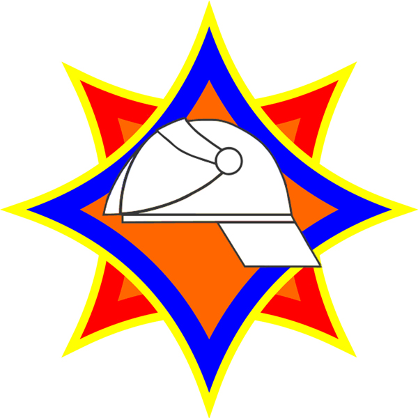 Геральдычны знак - эмблема Міністэрства па надзвычайнх сітуацыях Беларусі